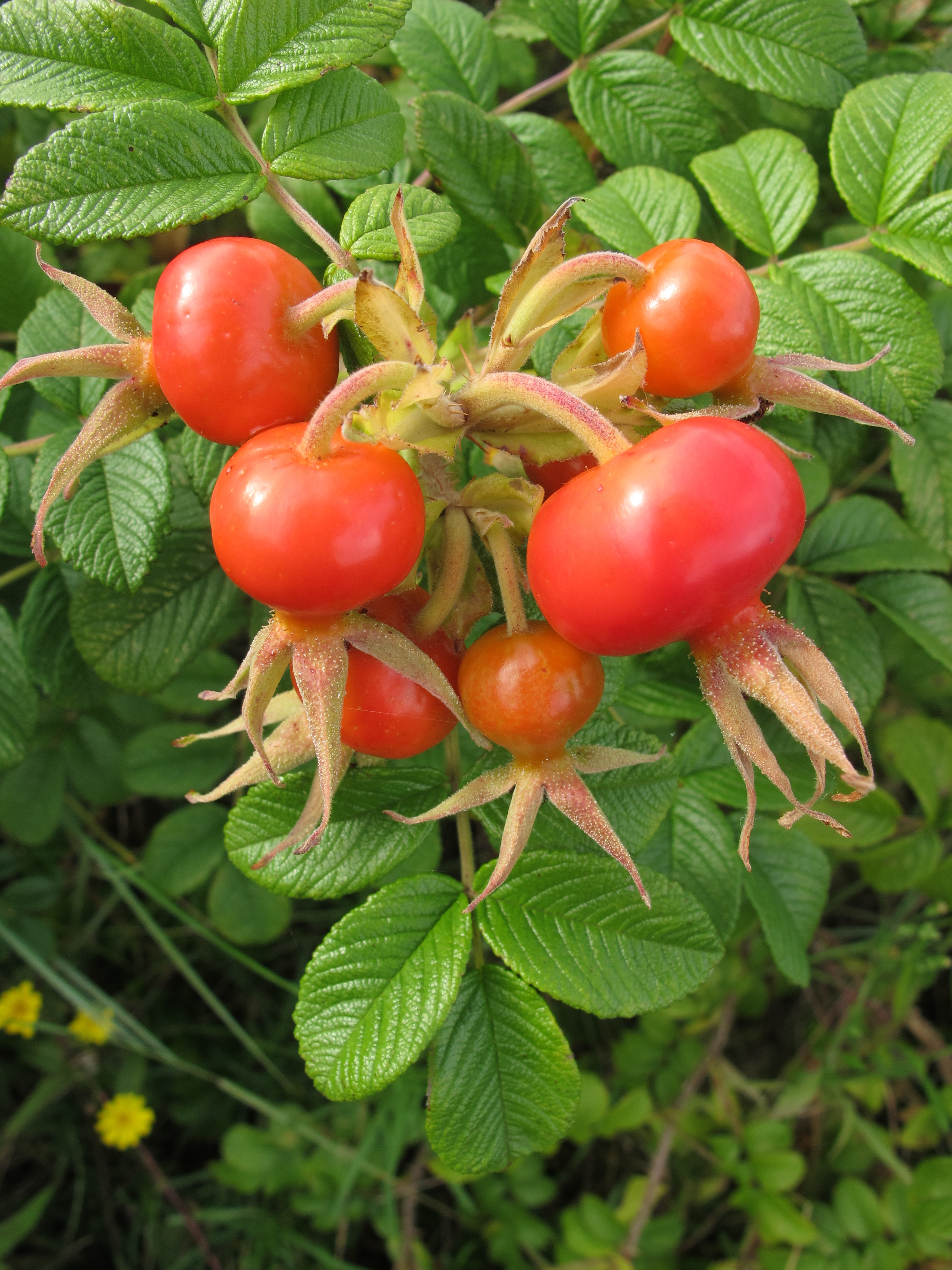 Rosa rugosa